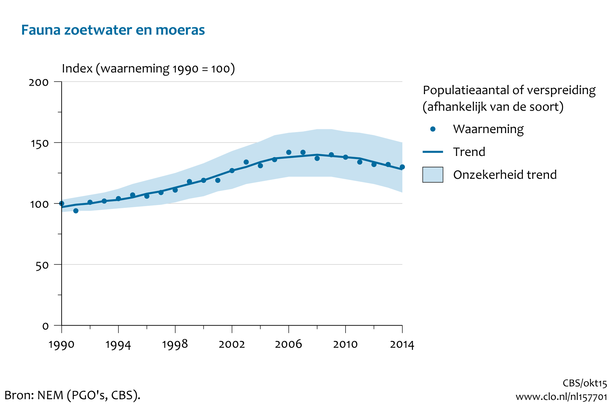 Trend fauna zoetwater en moeras, 1990-2014